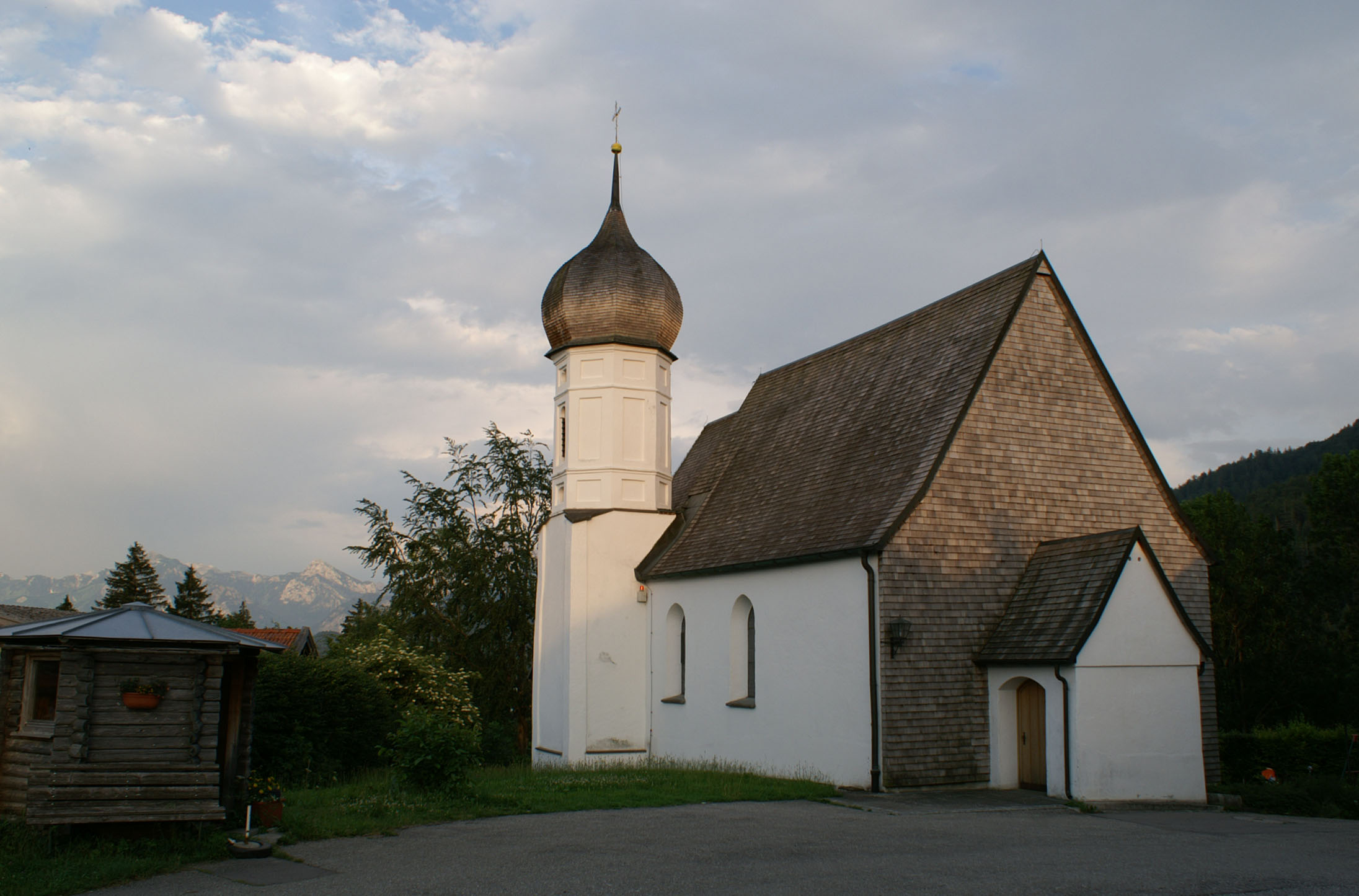 Kirche in Oberkirch, Füssen